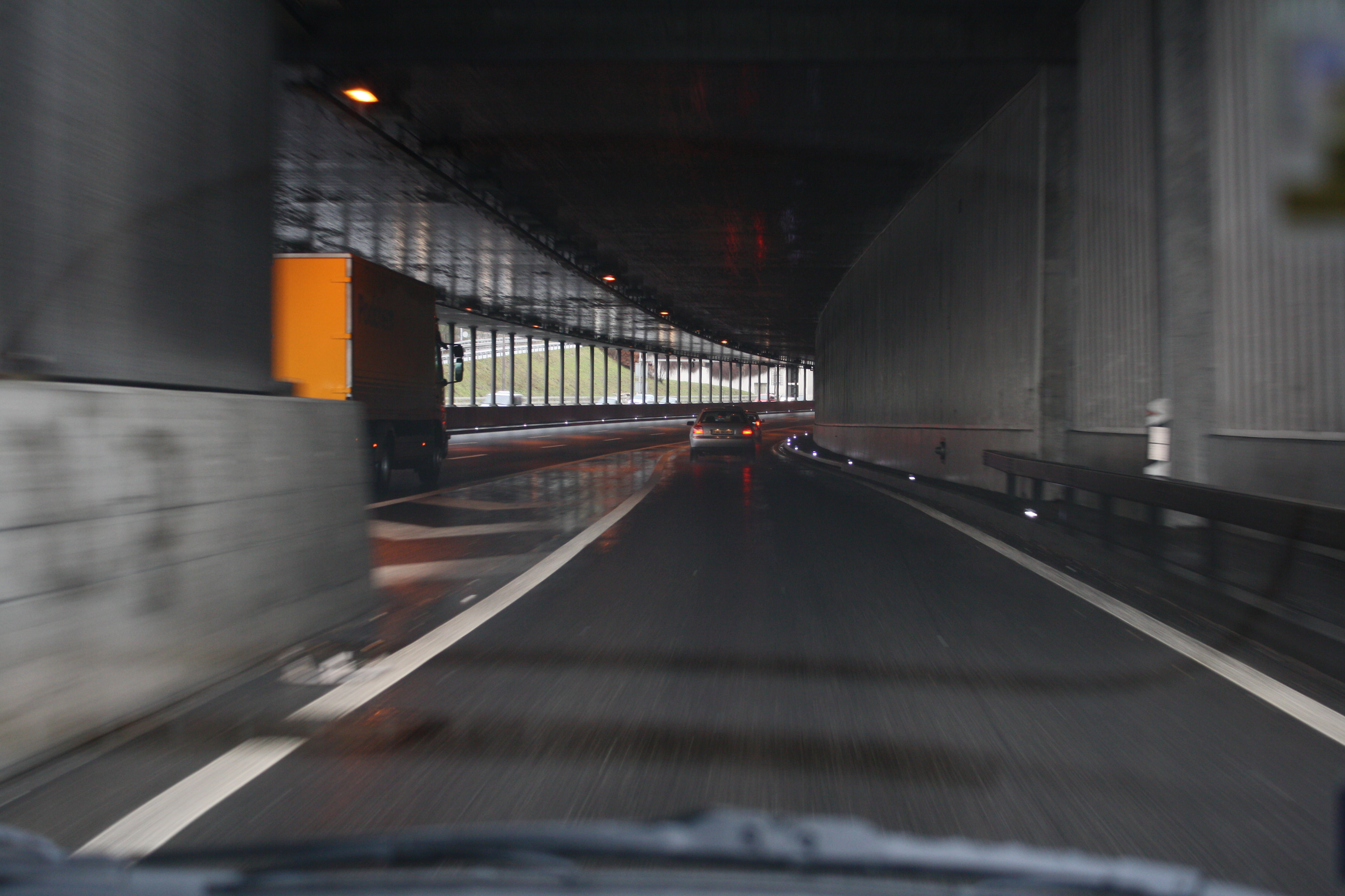 Autobahnauffahrt Neuenhof